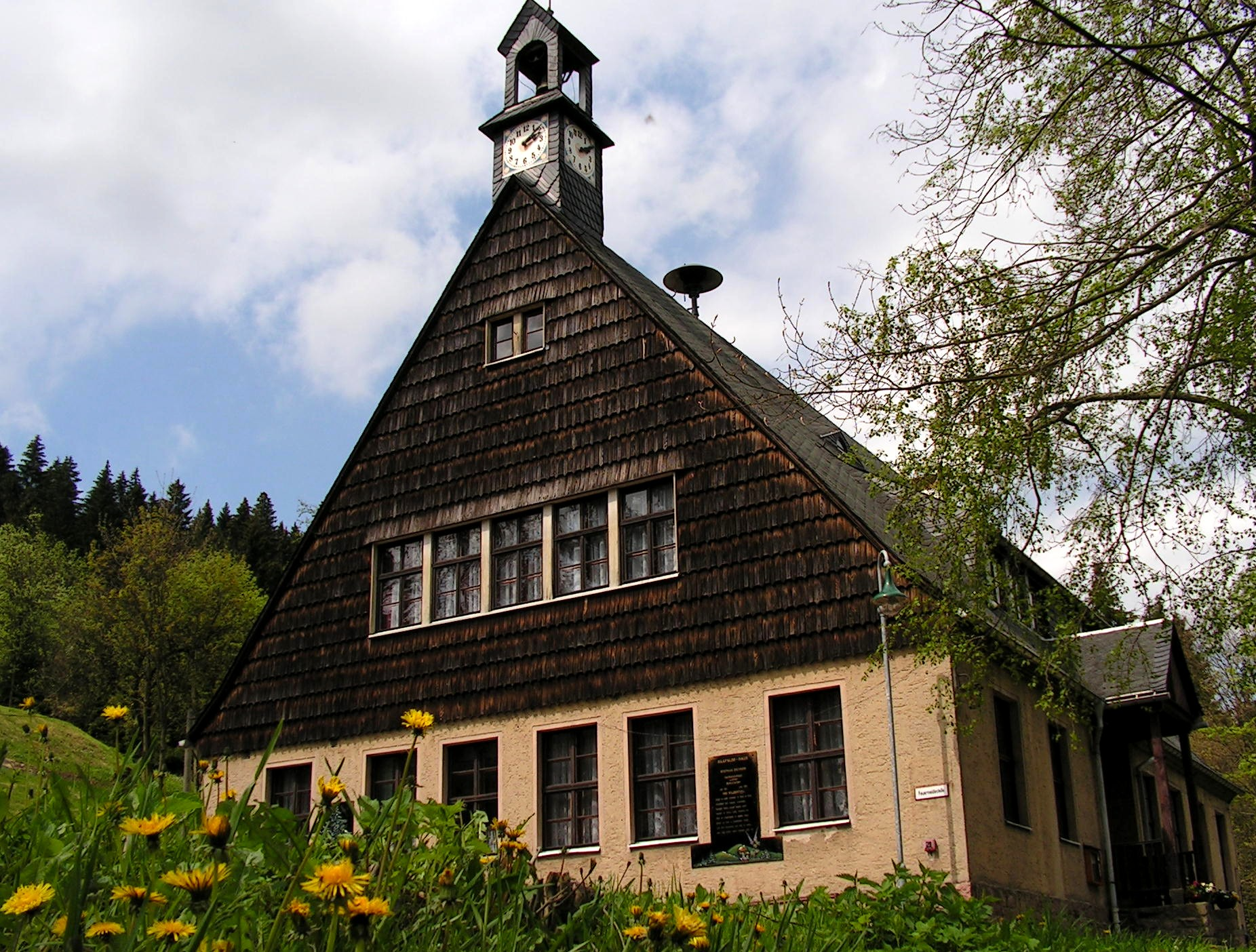 ehemalige Grenzlandschule und jetziges Dorfgemeinschaftshaus "Saafnlob-Haus" in Wildenthal bei Eibenstock am Fuße des Auersberges